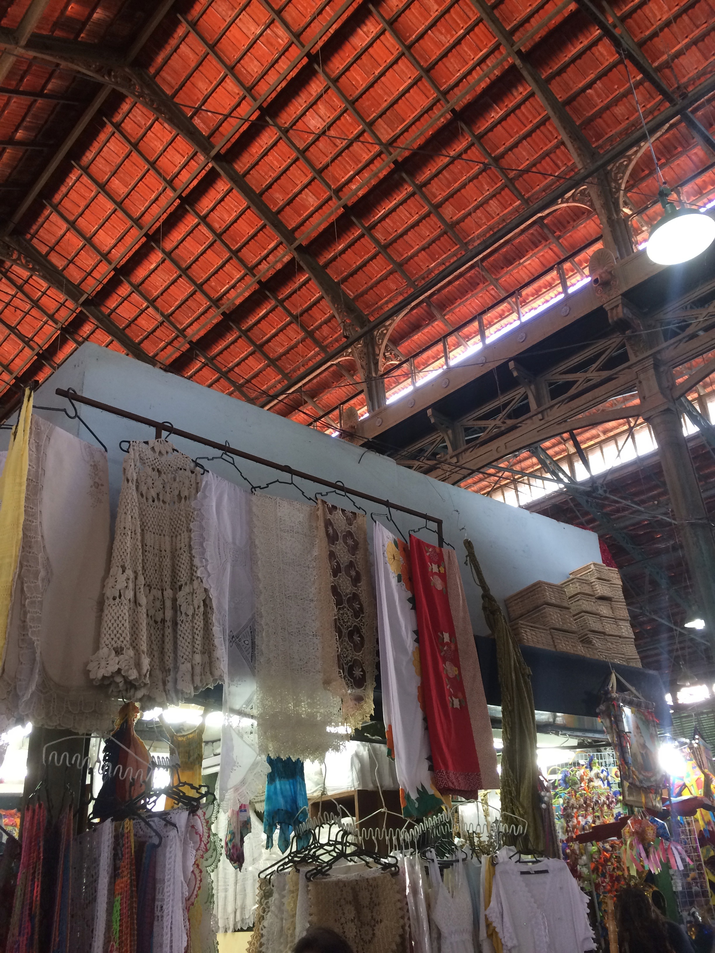 Mercado de São José